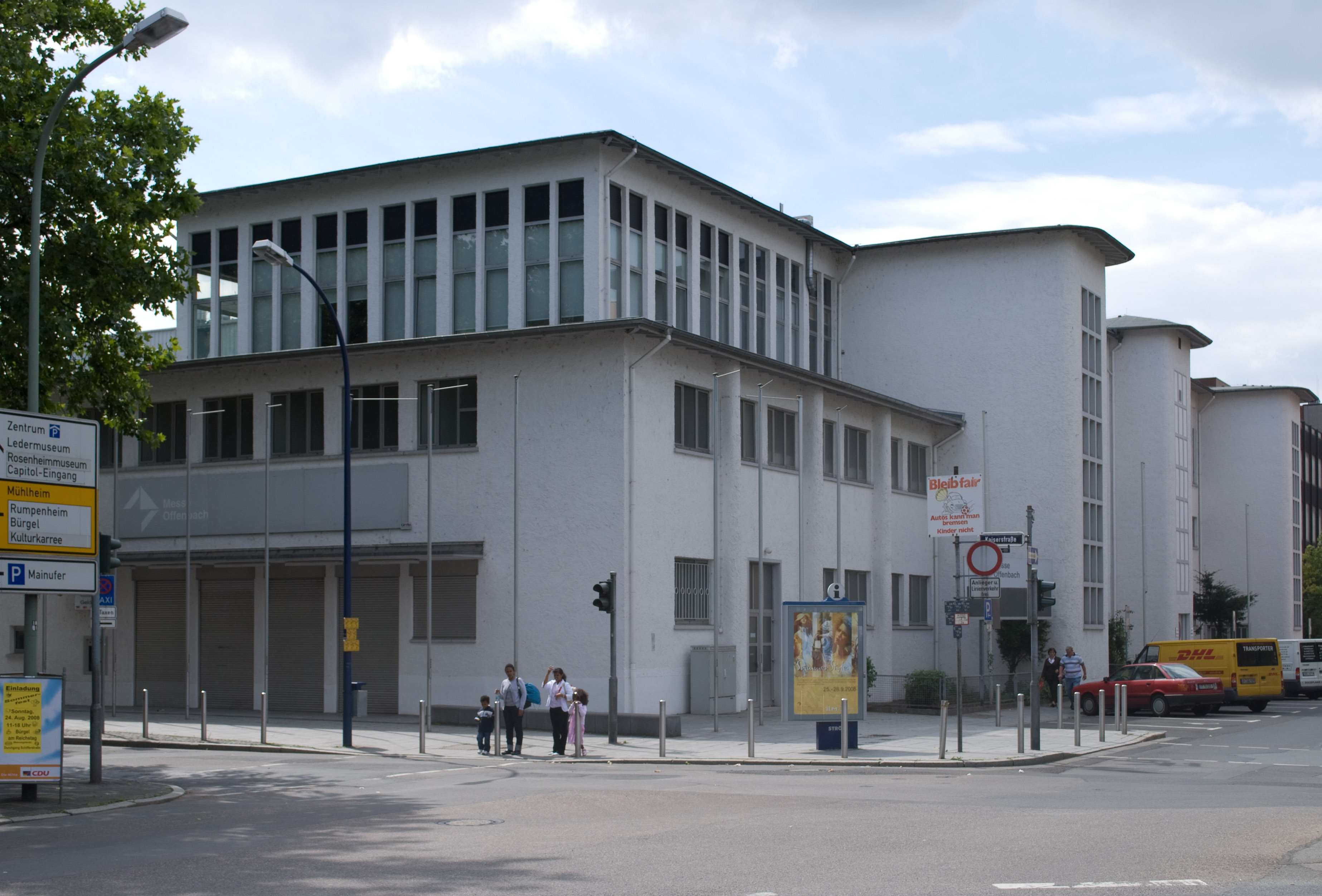 Messehallen der Messe Offenbach